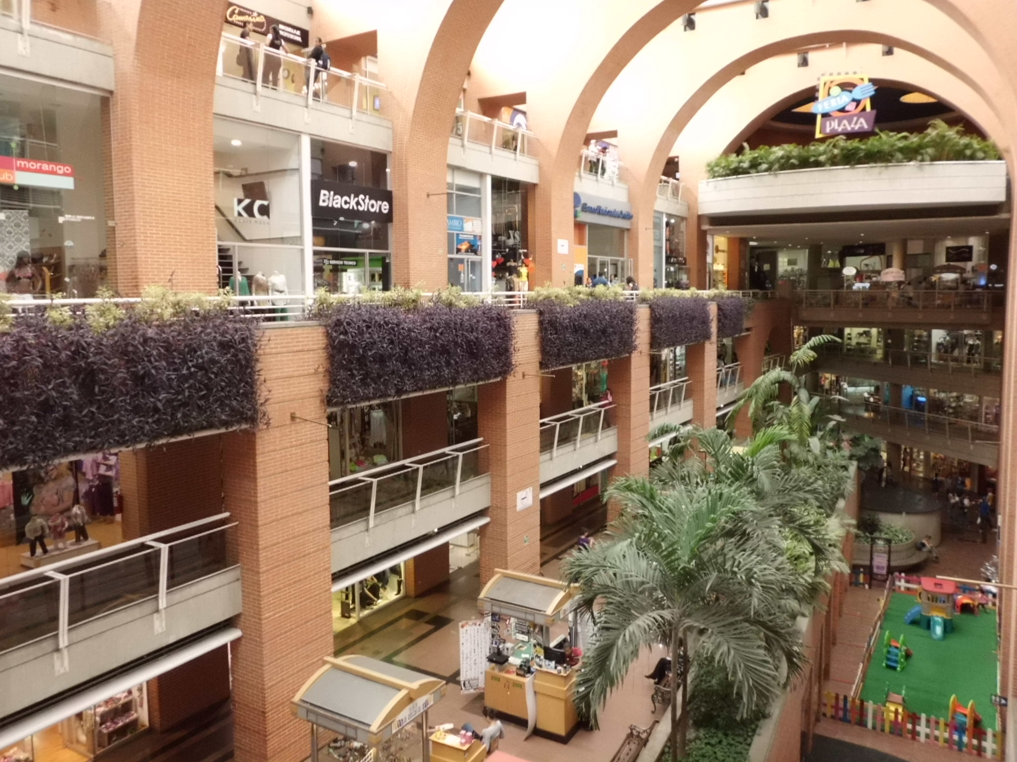 Enmarcado en una linda decoración natural para que se sientas como en casa